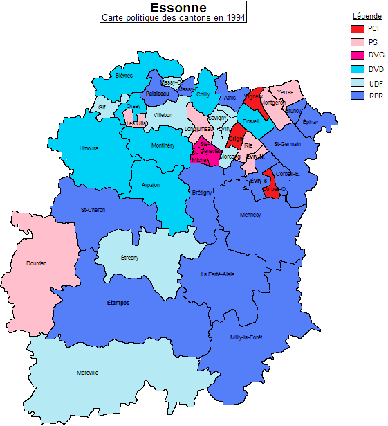 Carte politique des cantons de l'Essonne en 1994